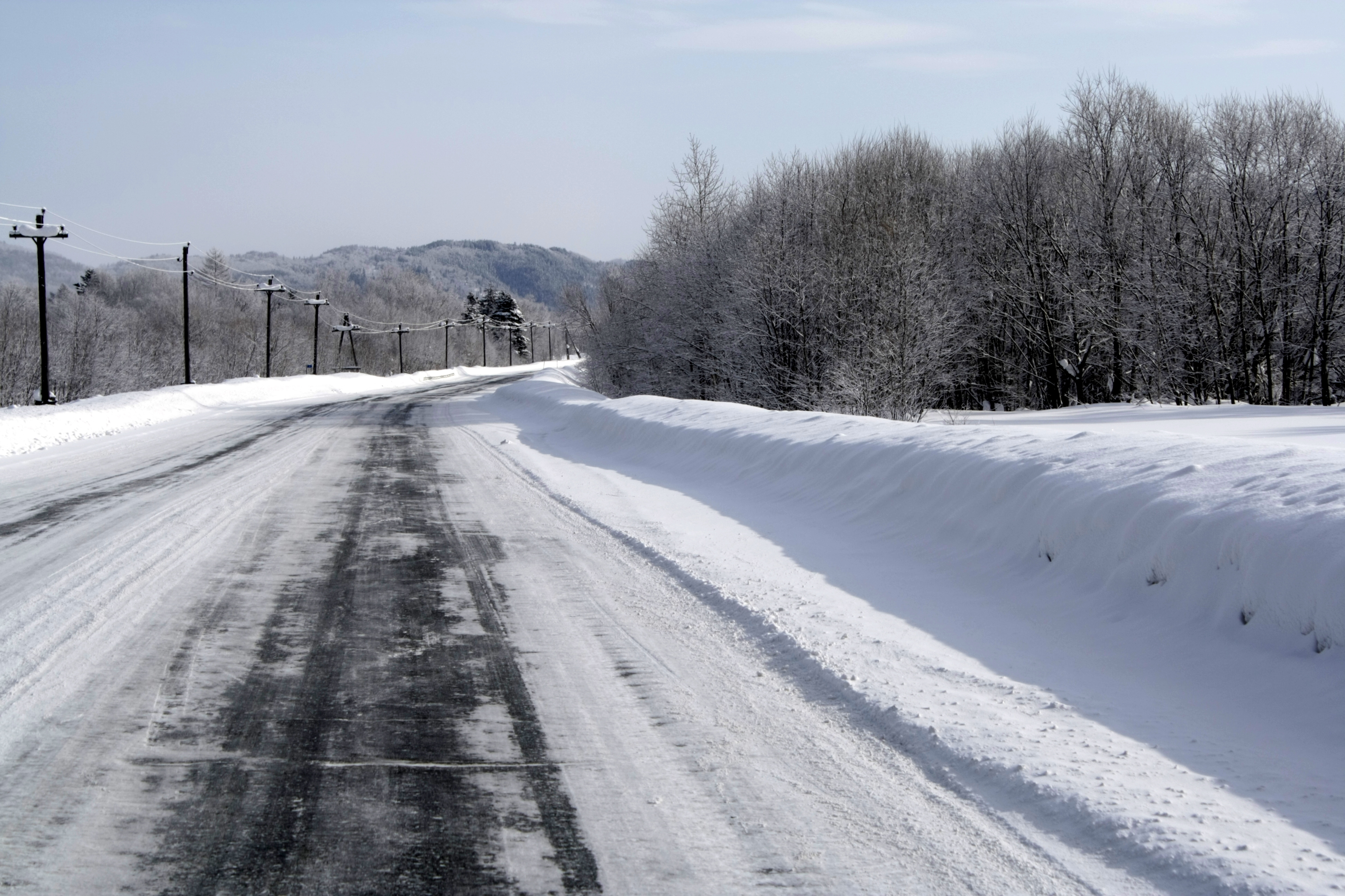 Kholmskiy r-n, Sakhalinskaya oblast', Russia